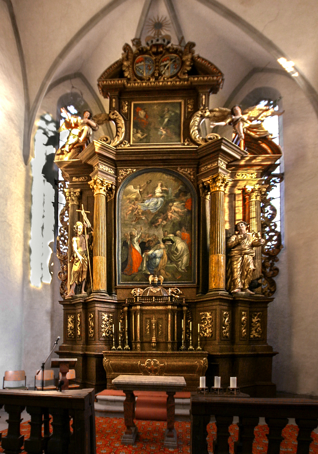 Barocker Hochalter mit den Giebelwappen der Würzburger Fürstbischöfe Julius Echter von Mespelbrunn und Johann Philipp von Greiffenclau zu Vollraths